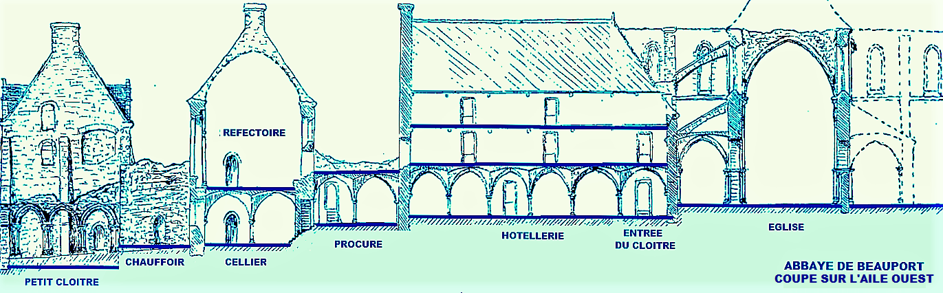 Paimpol (22), Abbaye de Beauport, Coupe sur l'aile est (image du domaine public modifiée)